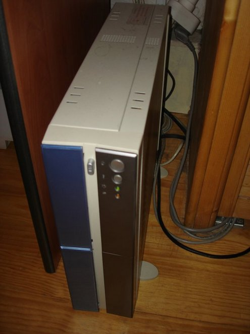 pegasos 2nd version (G4)